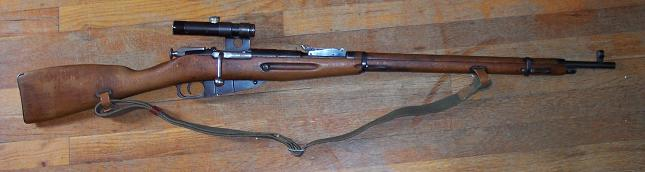 hungarian Mosin-Nagant M/52